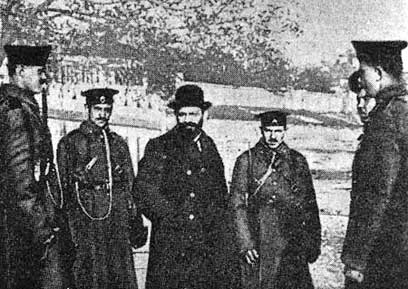 Description: Beilis arrêté en 1911 par la police tsariste. Photo publiée dans la presse en 1911 sans nom d'auteur. Origine: . Image dans le domaine public car plus de 70 ans sans auteur identifié. Source: "State Archives of the Kiev Oblast (GAKO)" de l'année 1913, qui sont maintenant dans le domaine public et libre d'accès depuis la fin de l'URSS